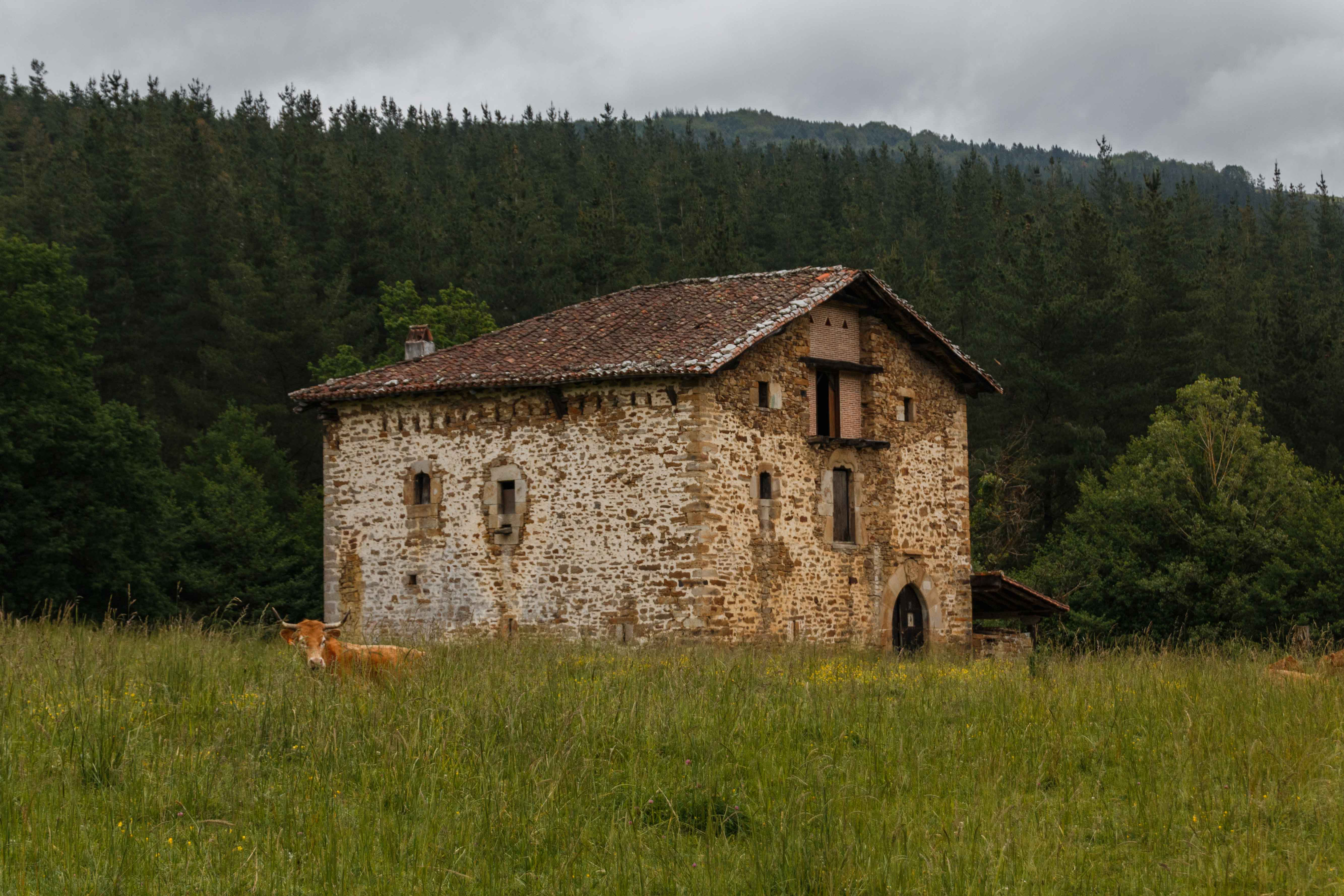 Mariaka dorretxea